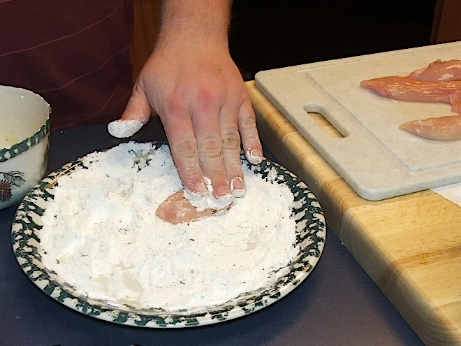 Mehlieren von Hähnchenbrust-Streifen